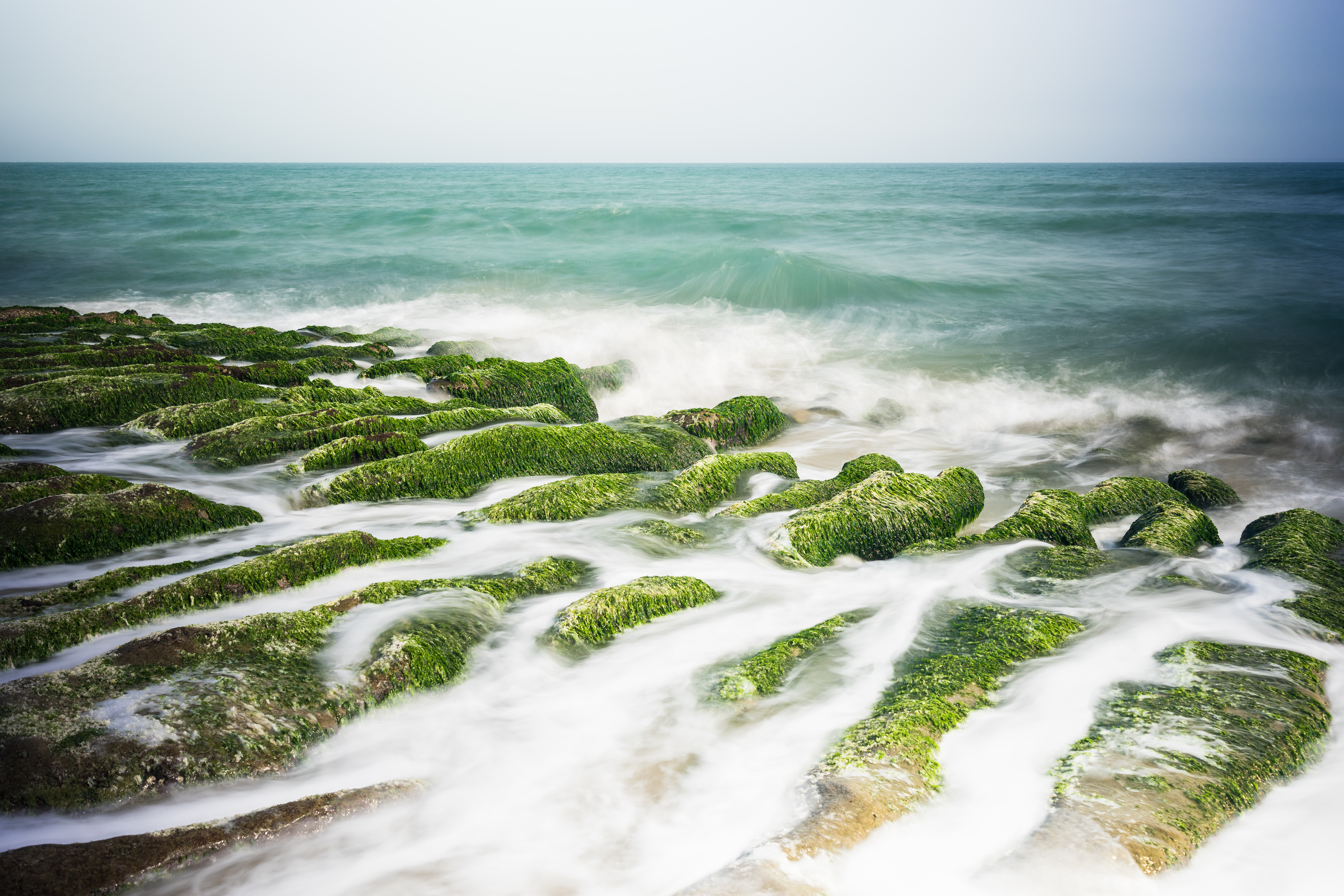 Laomei Stone Trench